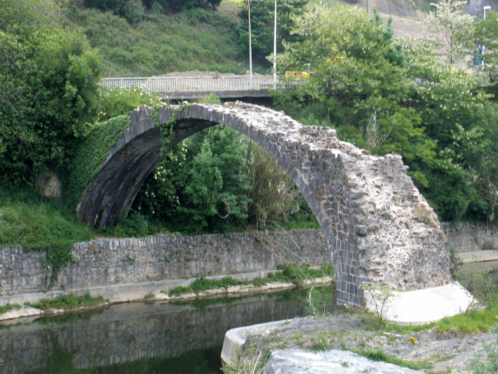 Puente de Vitorica (Llodio, Álava)